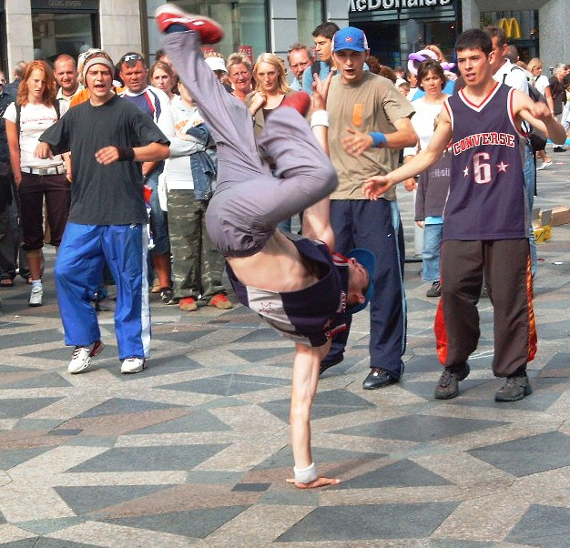 Break-Dance Gruppe in Kopenhagen